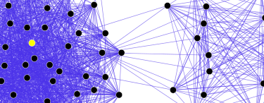 Антипозитивизам